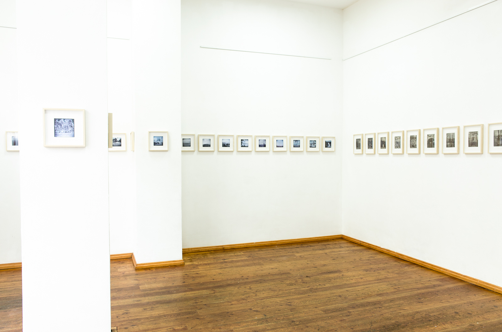 Wystawa "Siedem dróg" Wojciecha Sternaka, Berlin 2019 |permission=